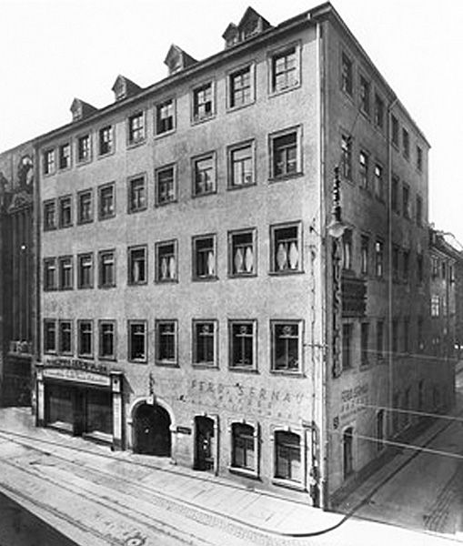 Das Haus Hohe Lilie in Leipzig, Neumarkt Ecke Preußergäßchen. Geburtshaus von Clara Schumann